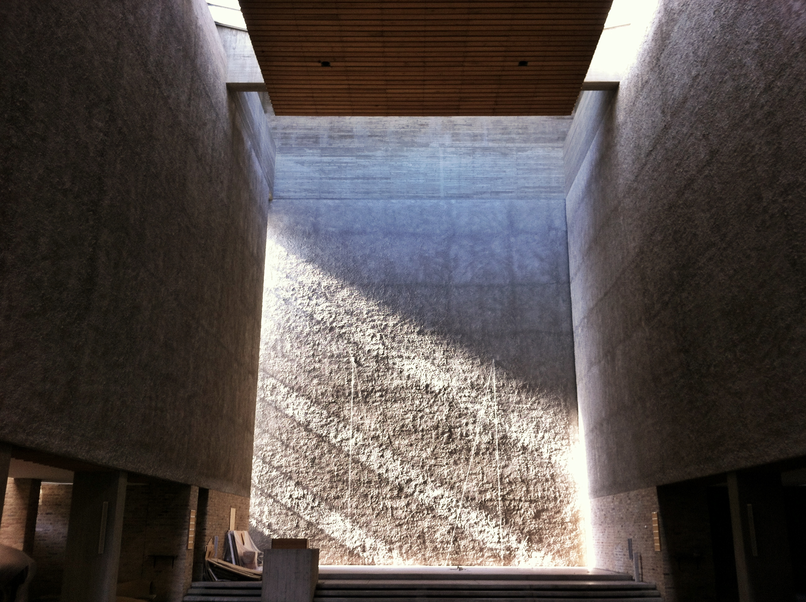 Lichteinfall St. Agnes